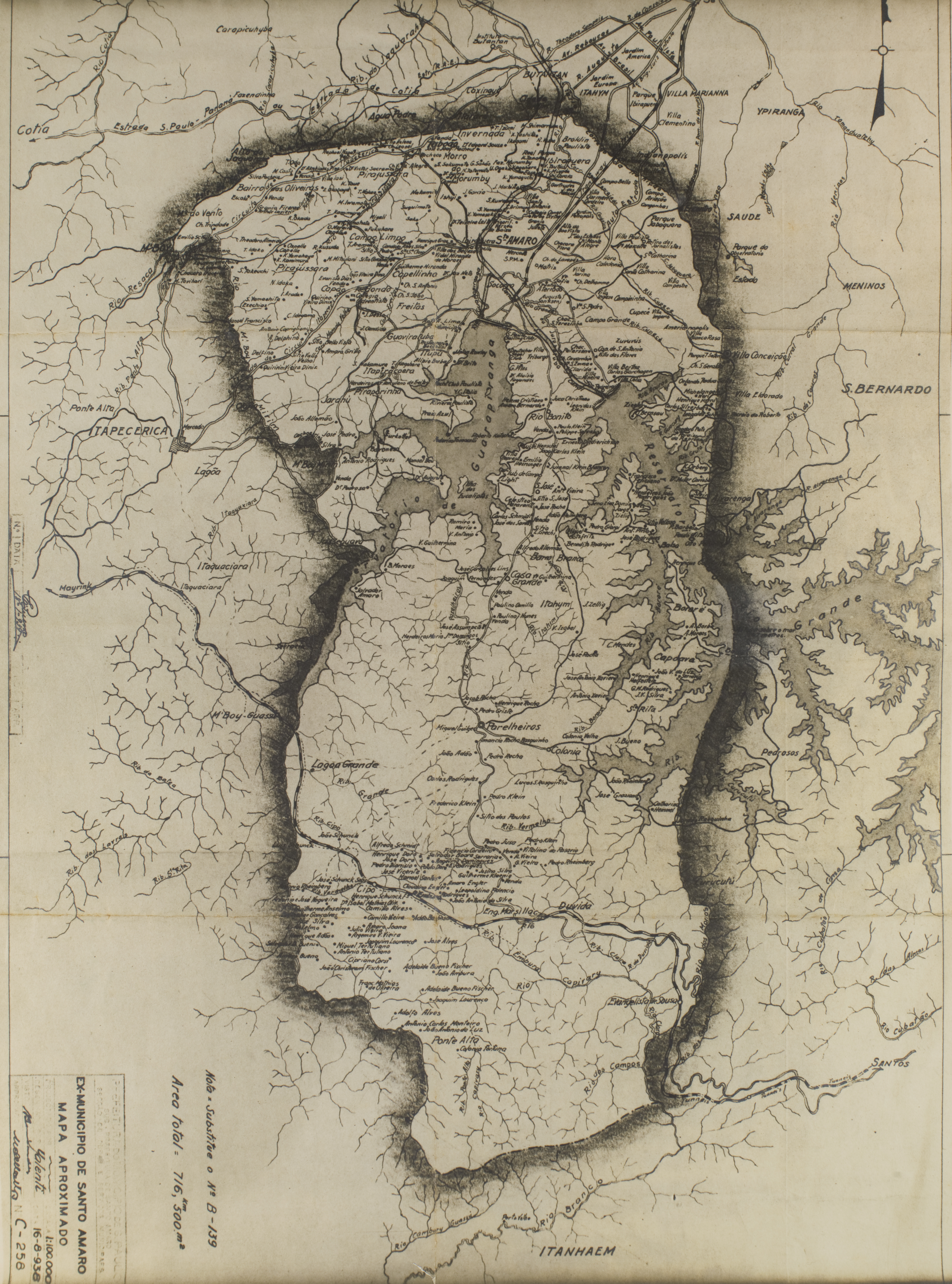 Obra que integra o acervo do Museu Paulista da USP. Coleção João Baptista de Campos Aguirra - Ref. Agente: Prefeitura do Município de São Paulo - Subprefeitura de Santo Amaro - Seção de Obras e Serviços Municipais